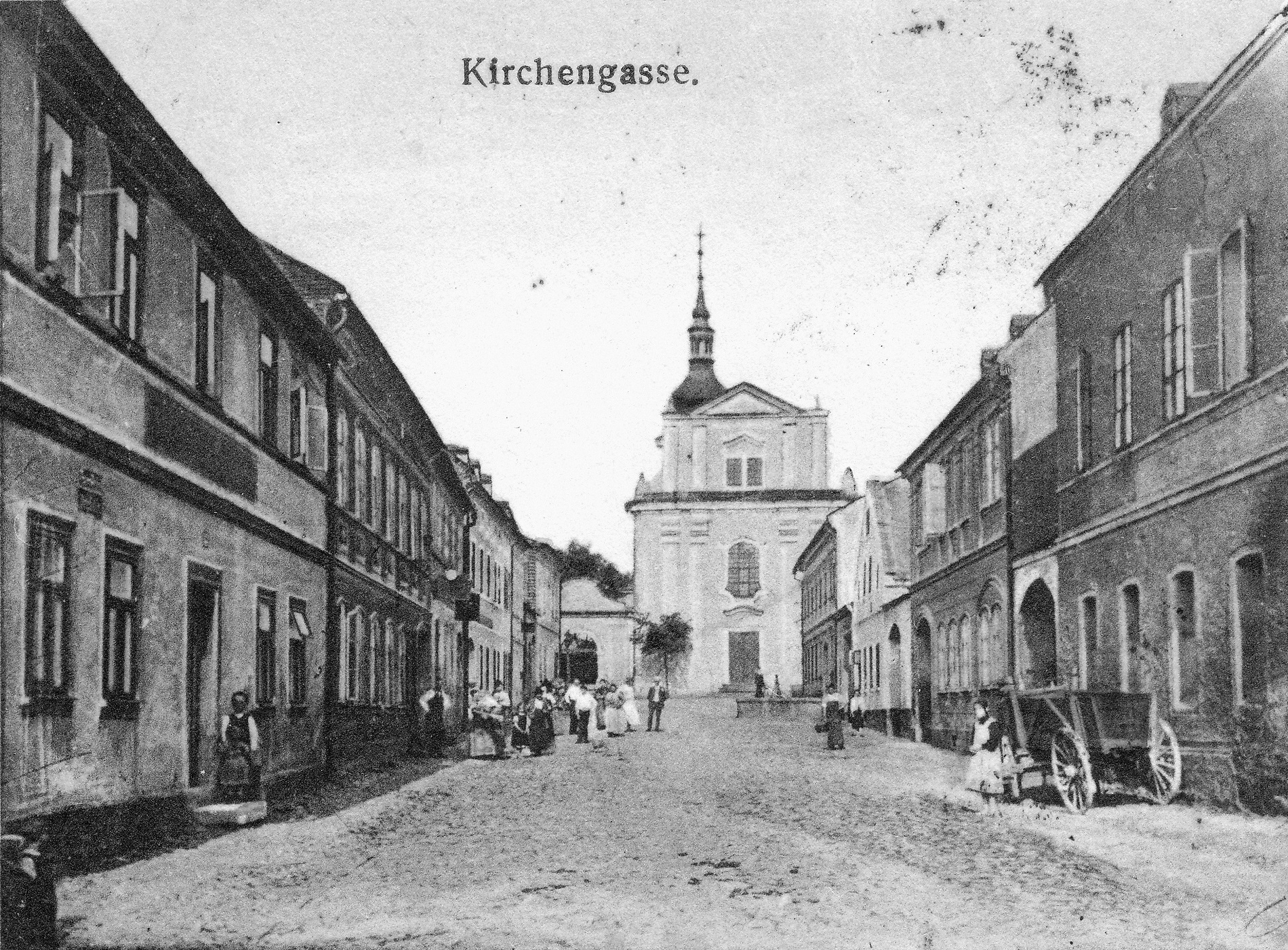 Toužim (Theusing), Pivovarská ulice (Brauhaus Gasse) kolem roku 1905.